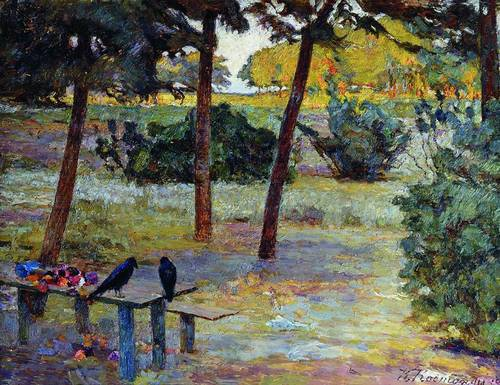 Ukrainian: Галки.